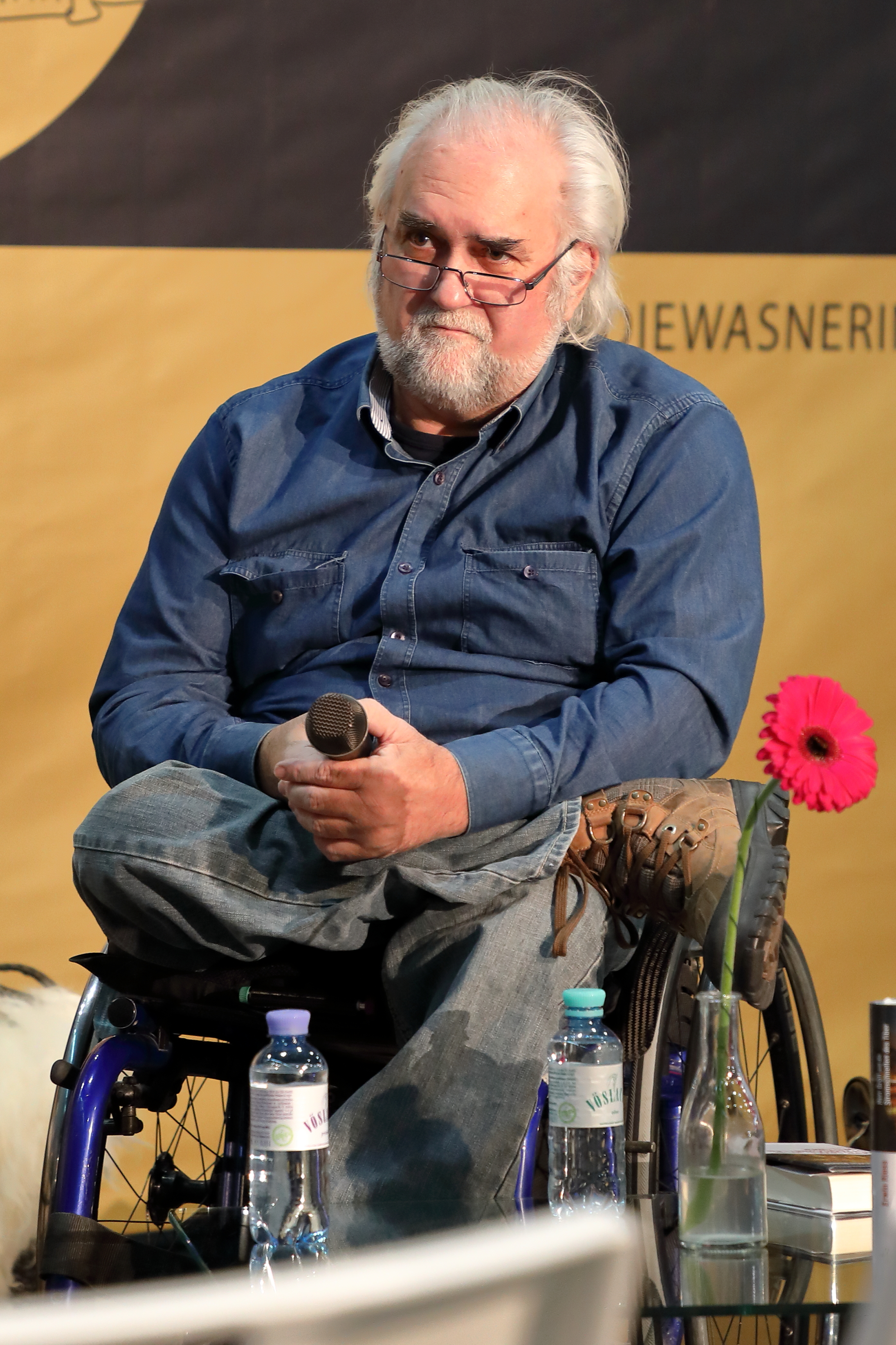 Der Schriftsteller Erwin Riess bei der Präsentation seines Buches Herr Groll und die Stromschnellen des Tiber auf der FM4-Bühne der Wiener Buchmesse 2017.